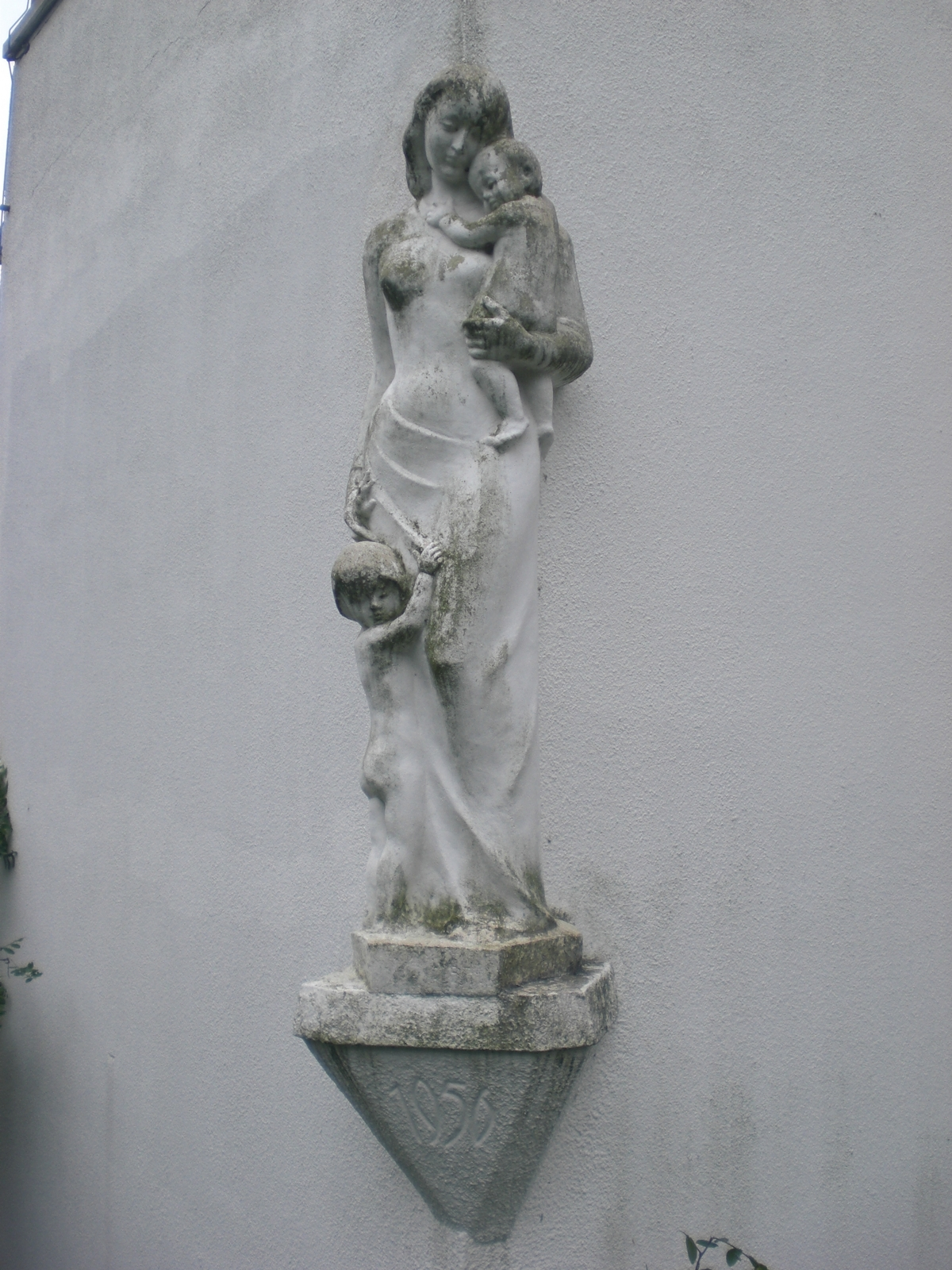 Wandplastik von Erwin Huber am Rosenschlößl in Graz am Rosenschlößlweg